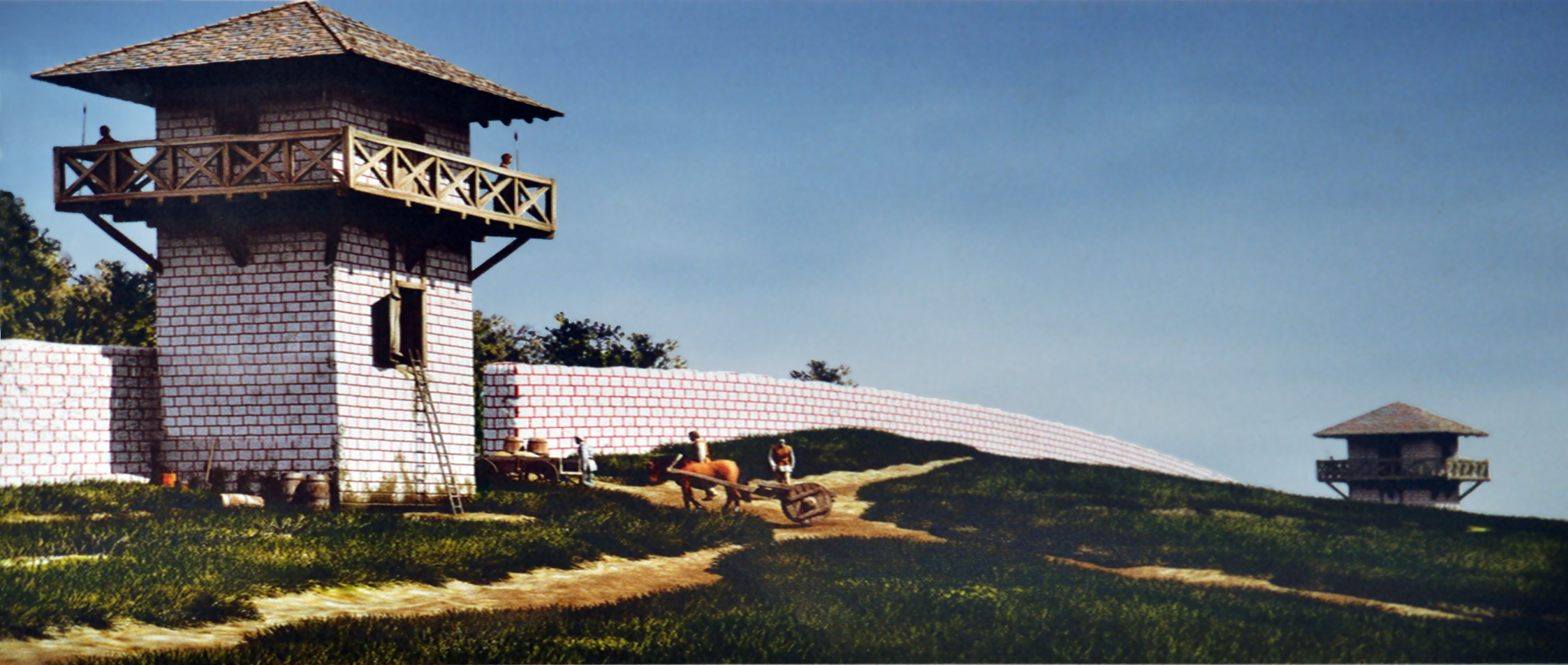 Wp 14/4 – Auf dem Vorderen Schloßbuck. Rekonstruktion.